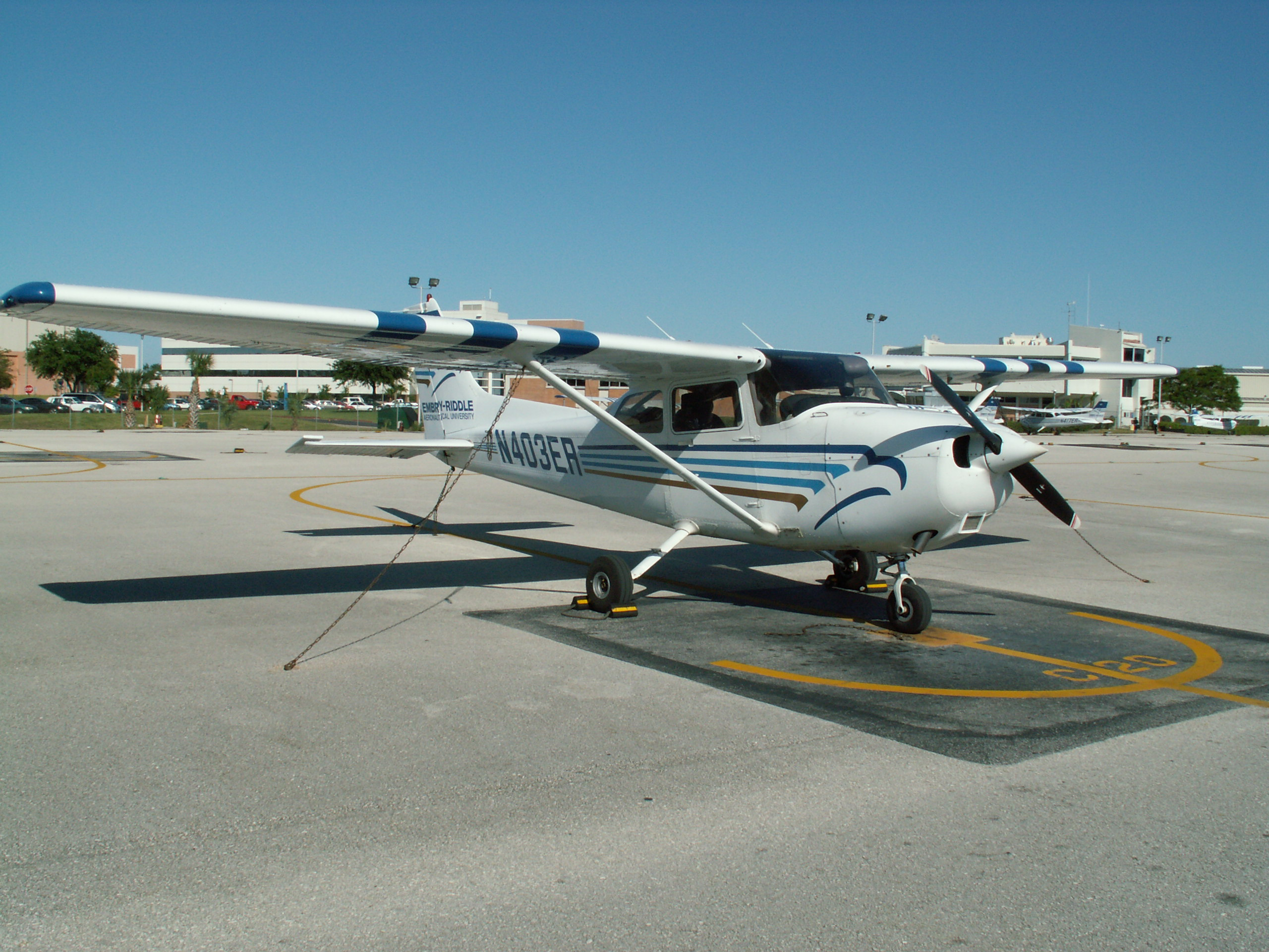 Embry-Riddle(ERAU)-C172